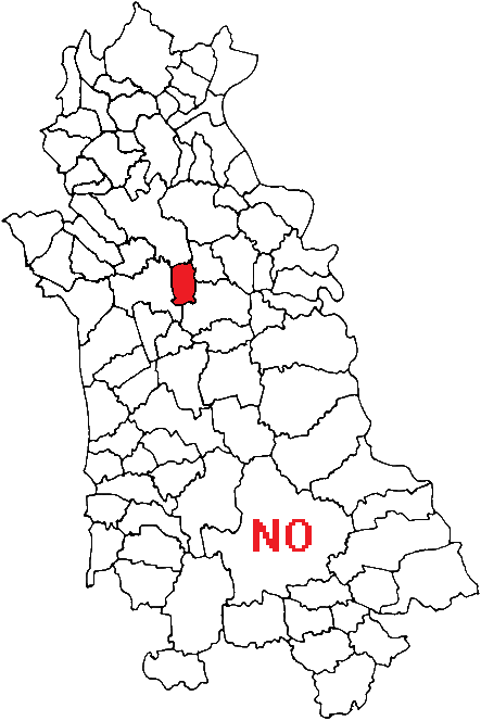 Mappa con posizione del comune nella provincia italiana di Novara